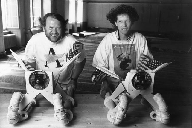 Volker Hesse und Stephan Müller Theater Neumarkt Zürich Copyright Monica Boirar aka Monica Beurer